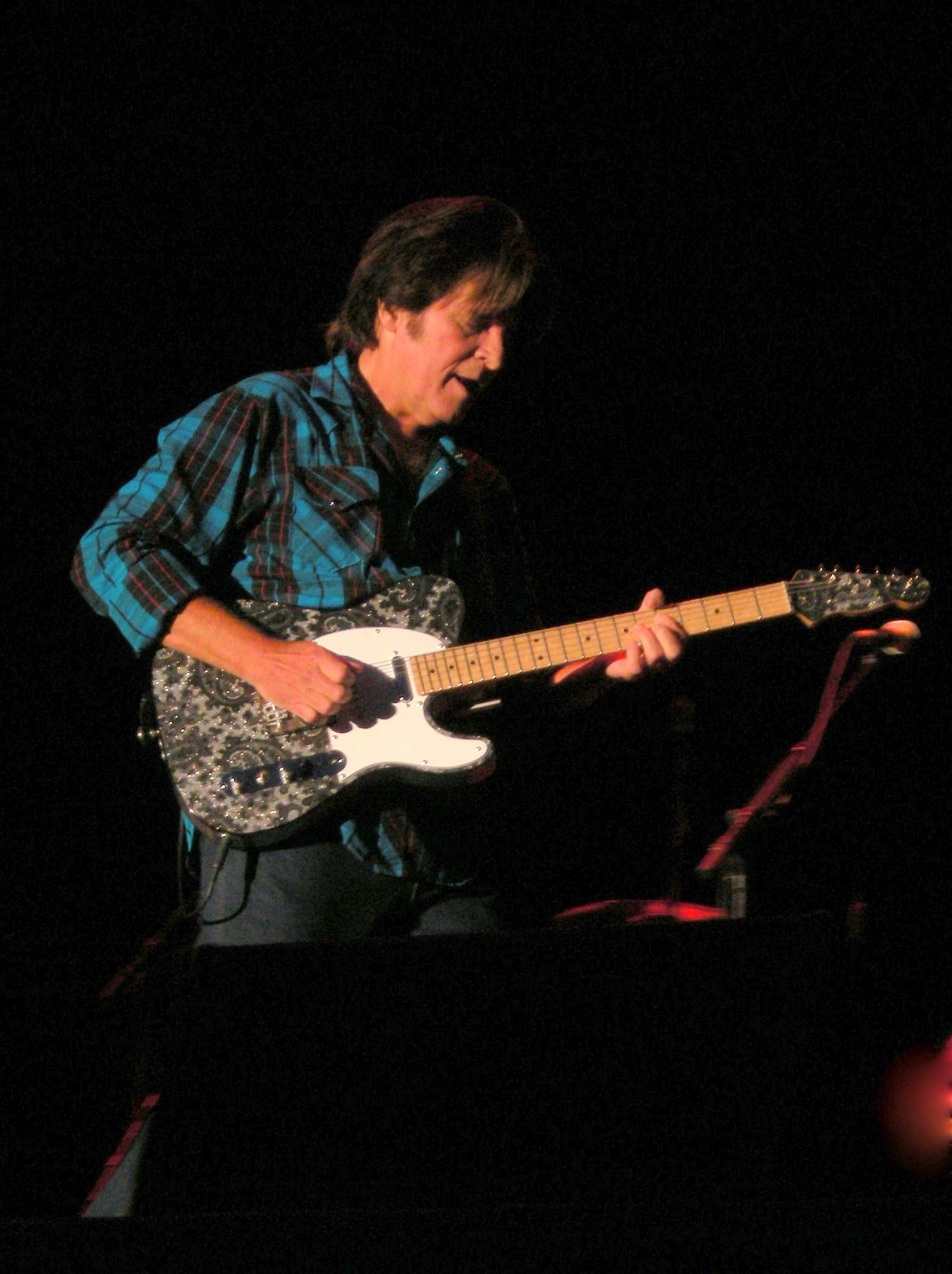 John Fogerty uppträder på Peace and Love i Borlänge 2010.